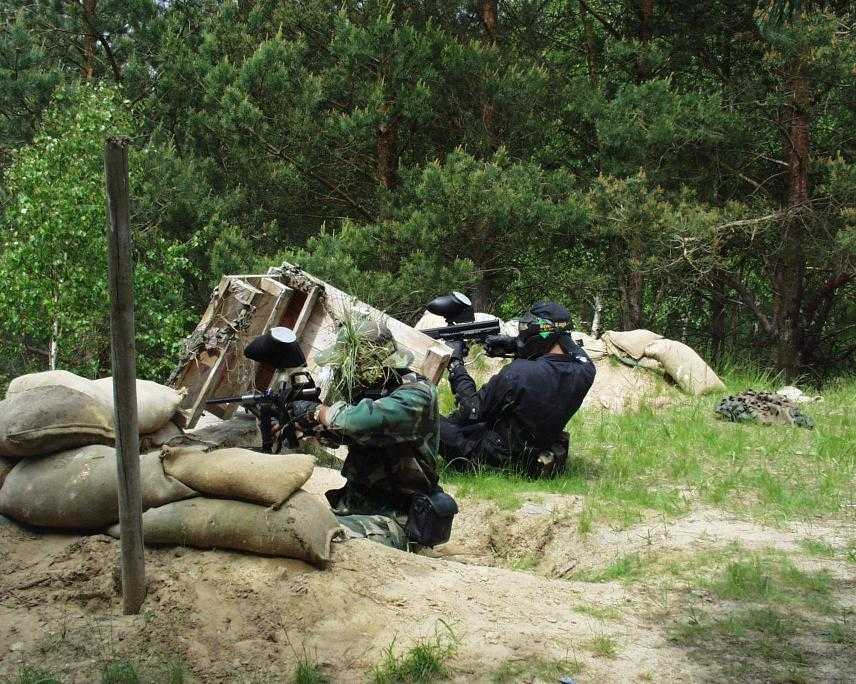 Gotcha-woodland